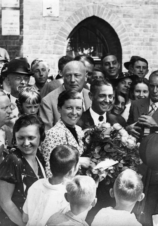 Heirat Elly Beinhorn, Bernd Rosemeyer Berlin.- Hochzeit von Fliegerin Elly Beinhorn und Rennfahrer Bernd Rosemeyer Abgebildete Personen: Rosemeyer, Bernd: Automobilrennfahrer, verheiratet mit Elli Beinhorn, Deutschland (GND 118749722) Beinhorn, Elly: Sportfliegerin, Schriftstellerin, Deutschland (GND 118508490)